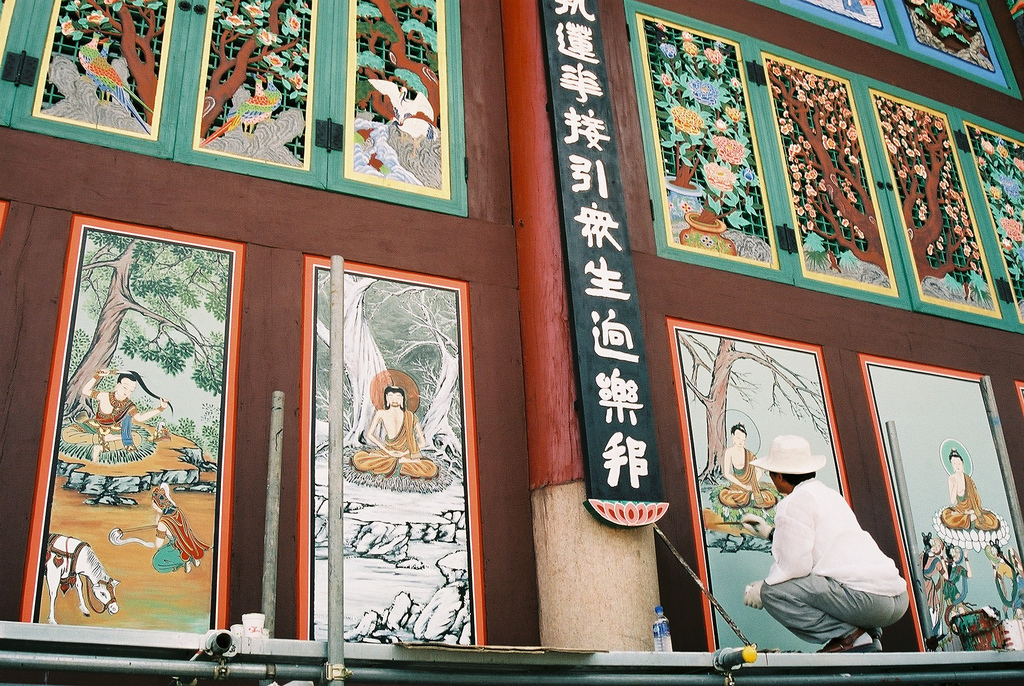 서울의 절